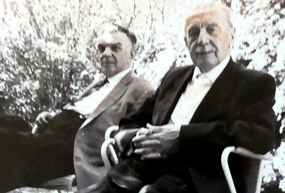 Privatfoto Herbert Capeller (links) mit seinem Vater Alois Capeller - Frühjahr 1967